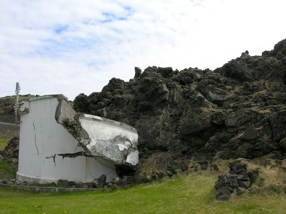 Vestmannaeyjar, Iceland